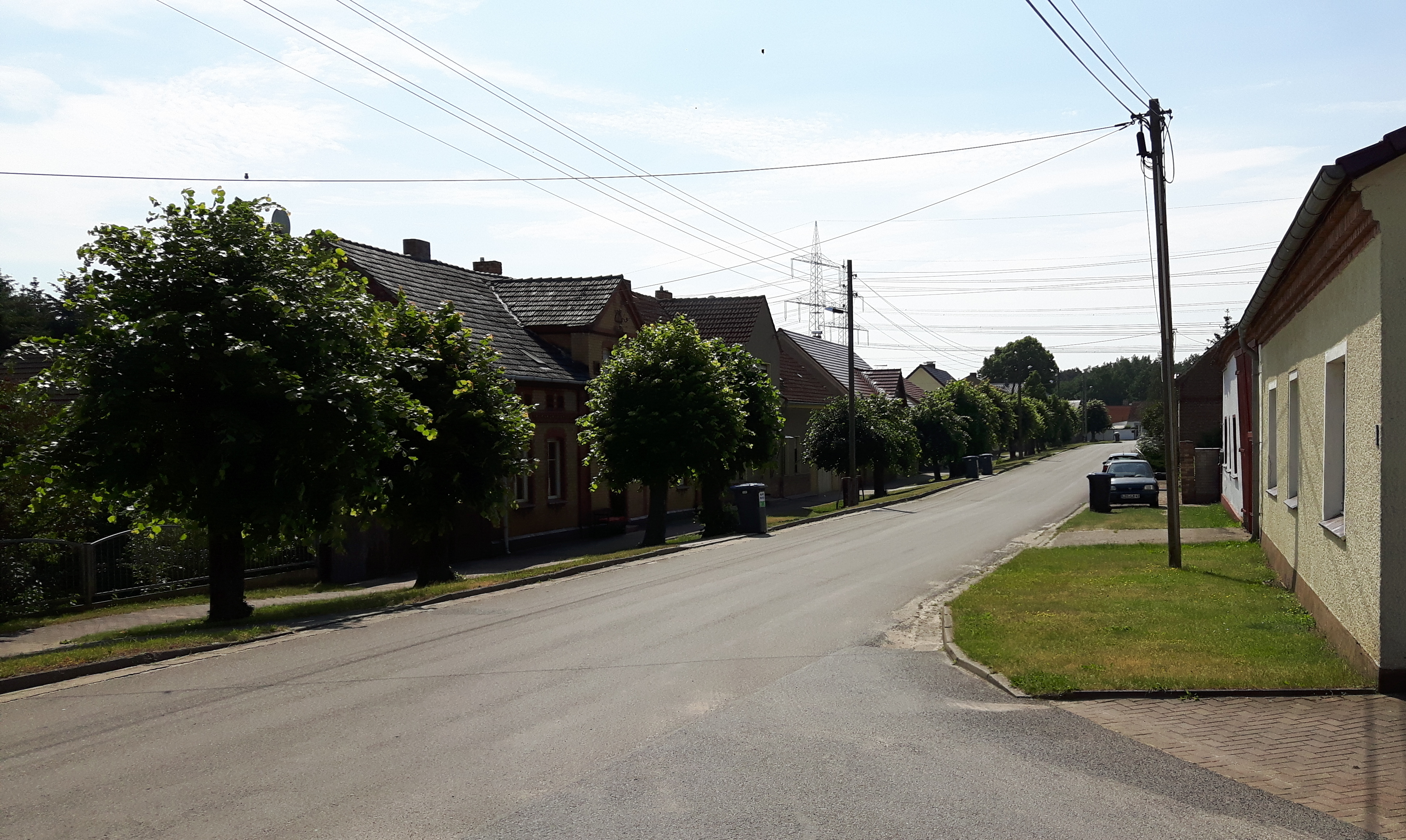 Die Dorfstraße in Kaden, Stadt Luckau, LDS, Brandenburg